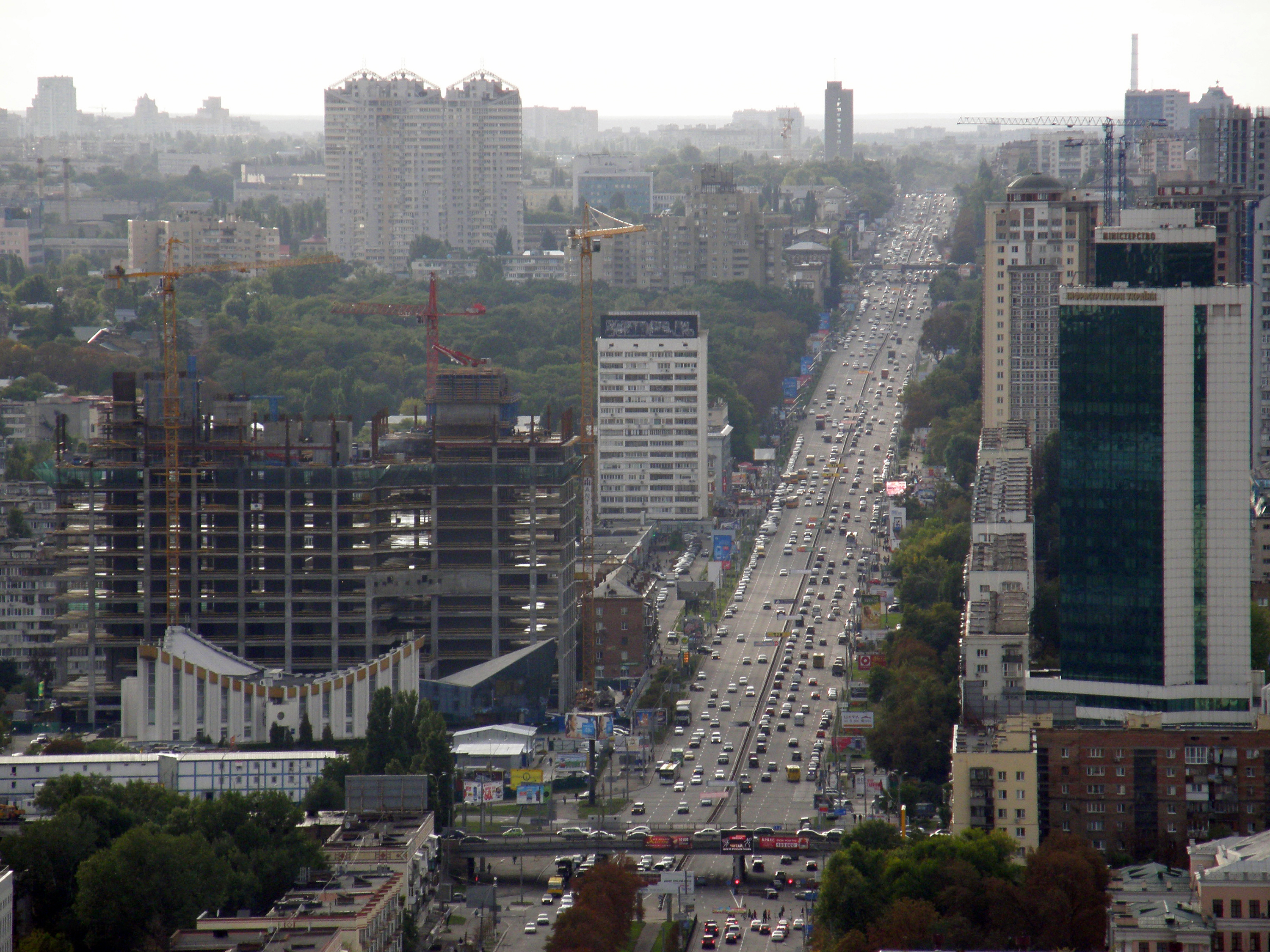 проспект Победы от Воздухофлотского путепровода